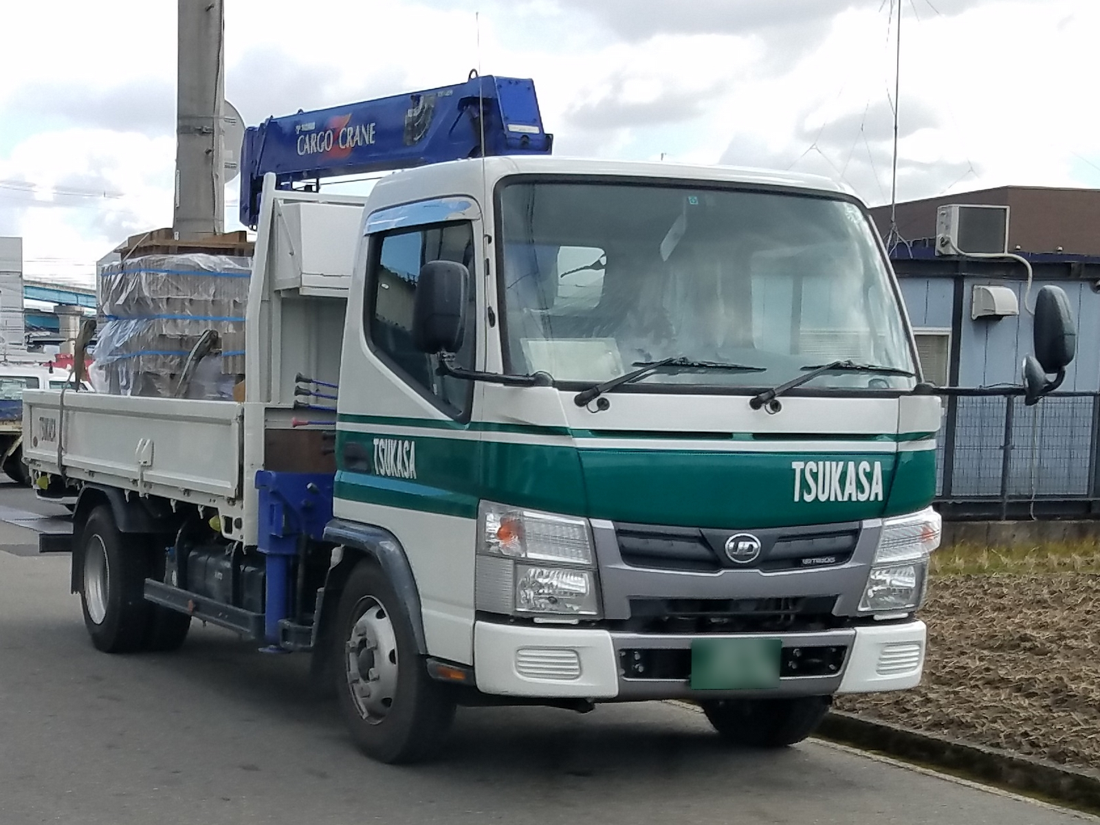 カゼット 平ボデー